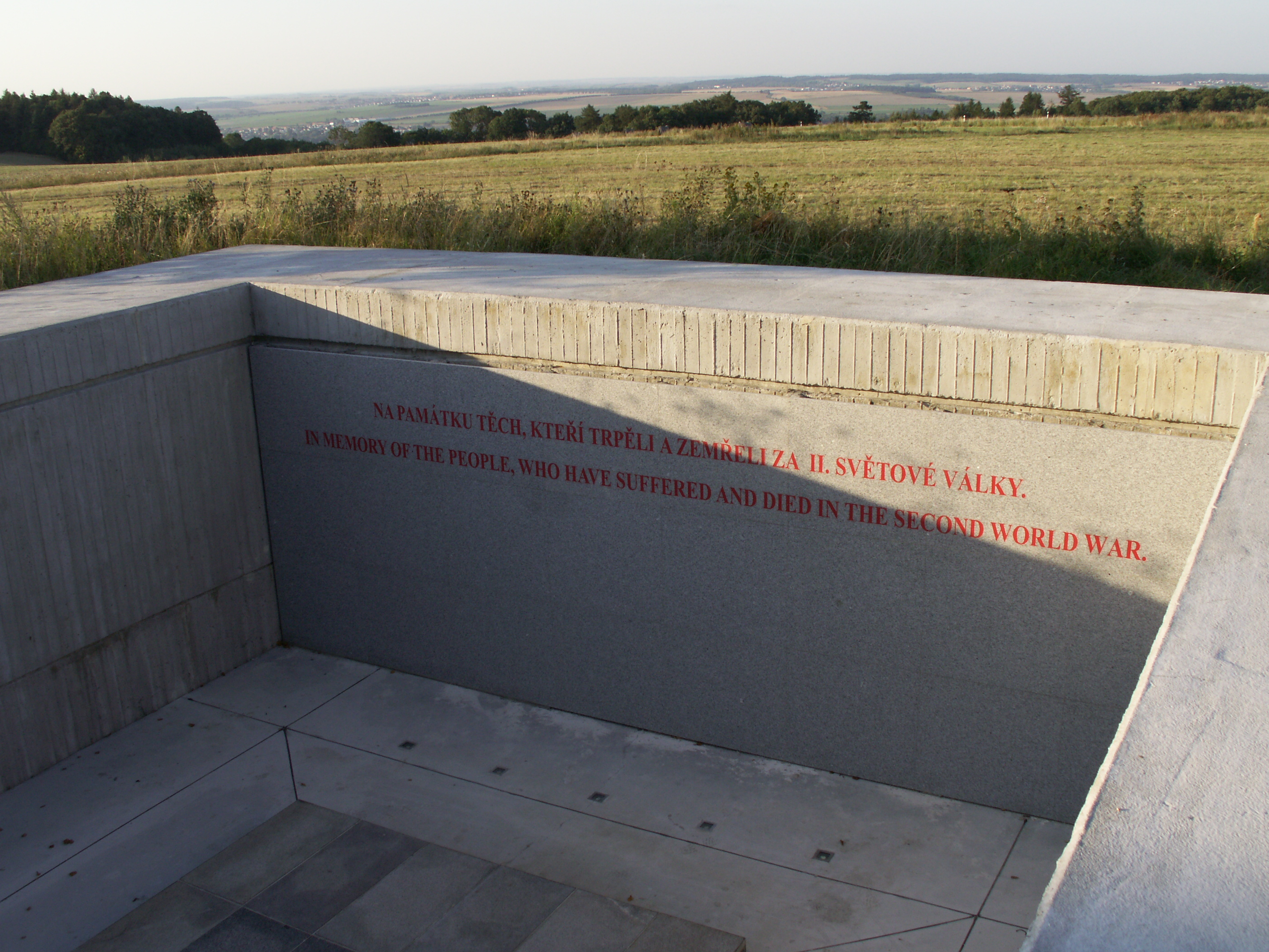 národní památník války u Hrabyně